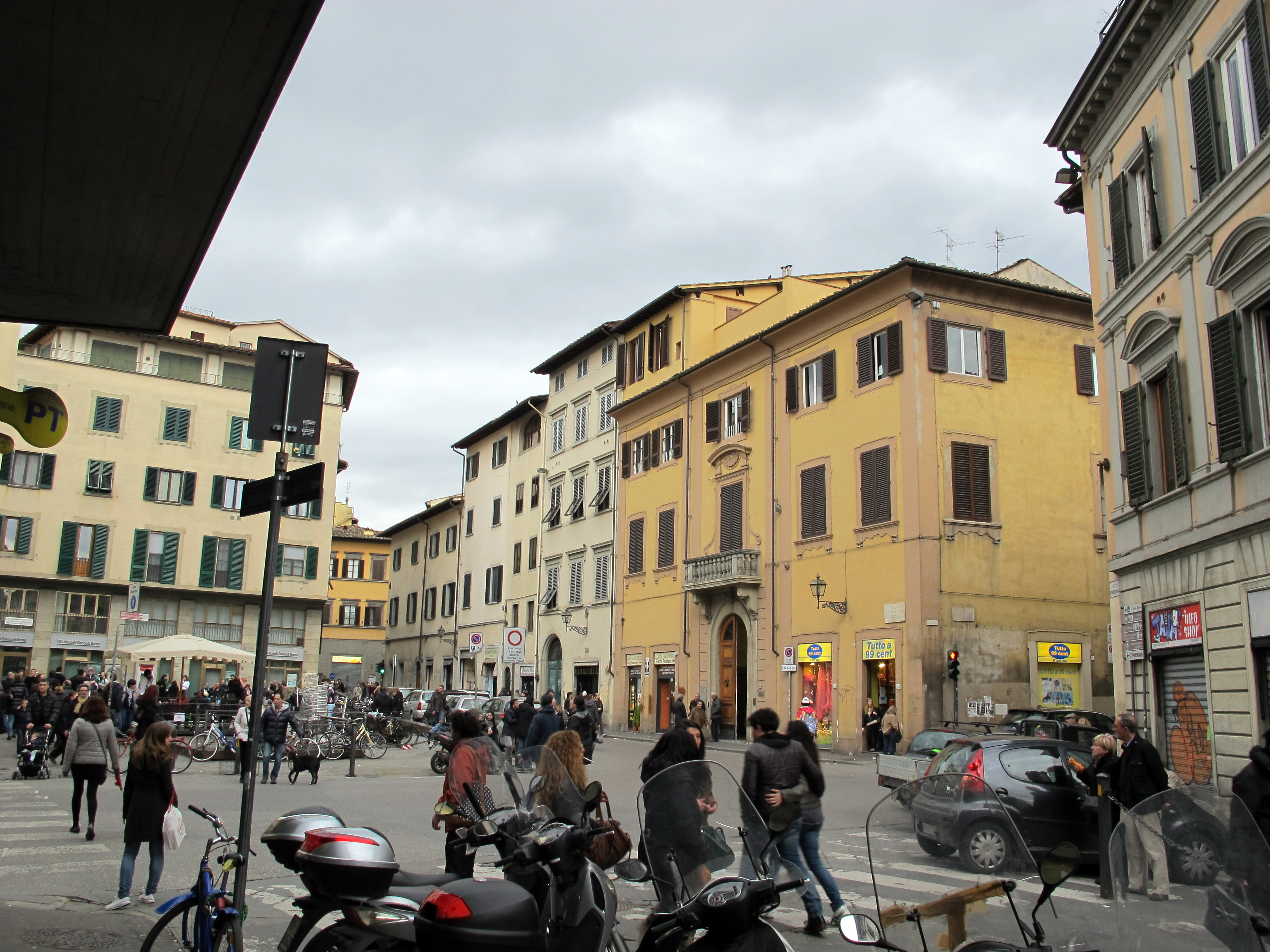 Piazza salvemini